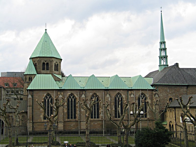 Das Essener Münster von der Südseite aus gesehen